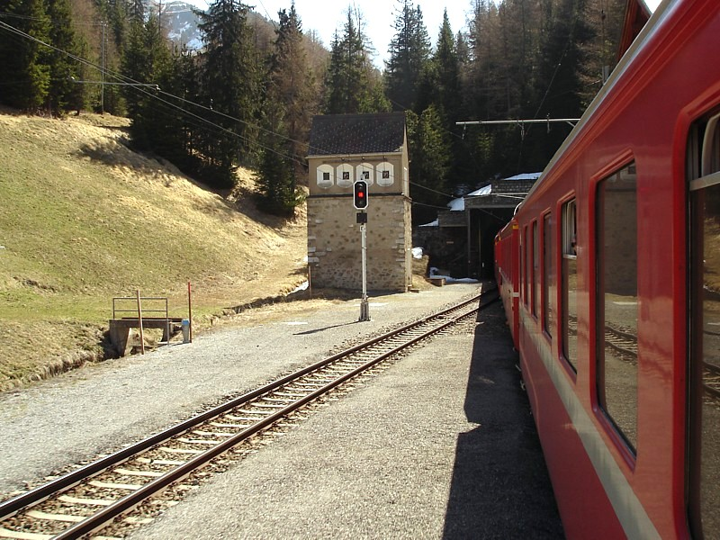 Portail nord du tunnel de l'Albula à Preda